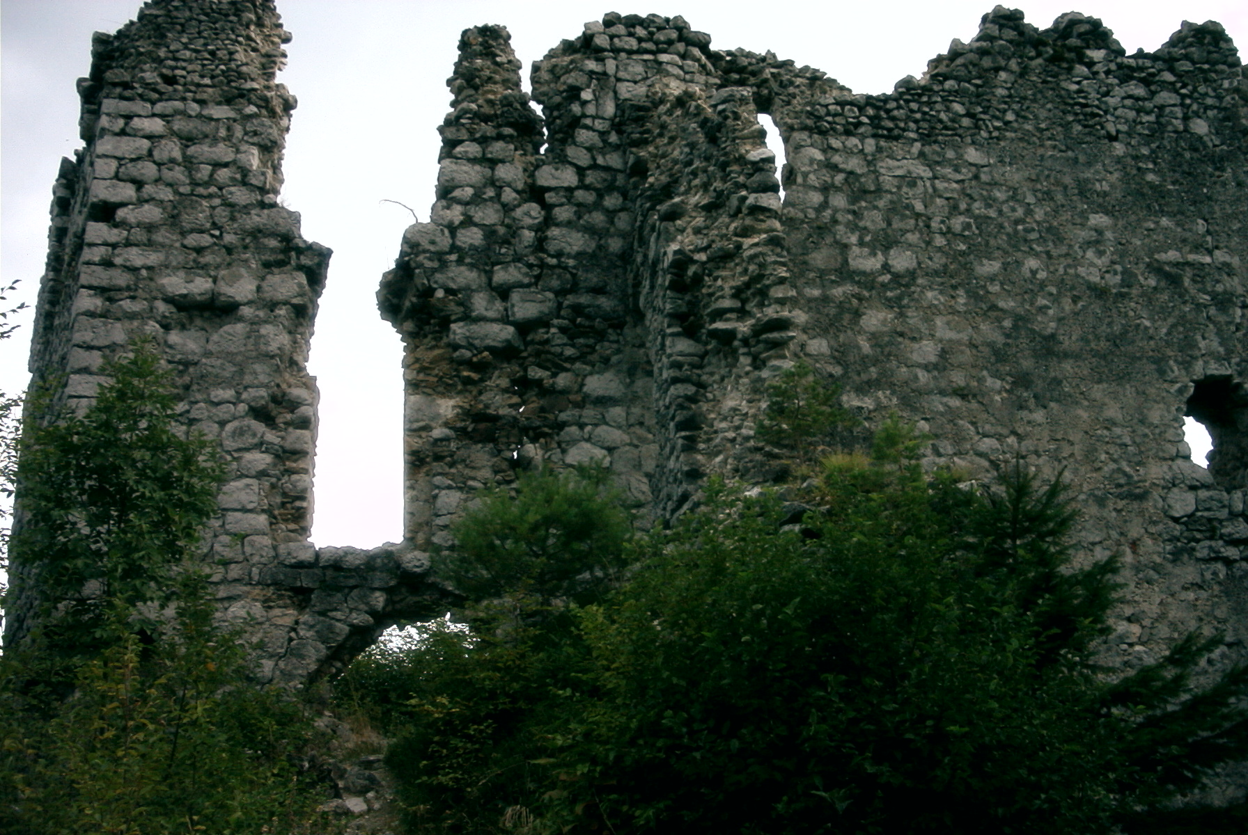 Lindek - castle